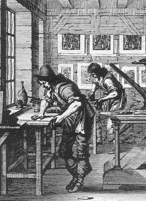 Abraham Bosse Printing 0003.jpg: офорт фрагмент